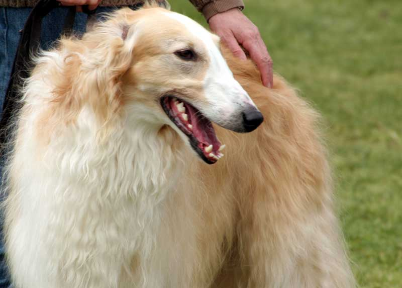 A Borzoi